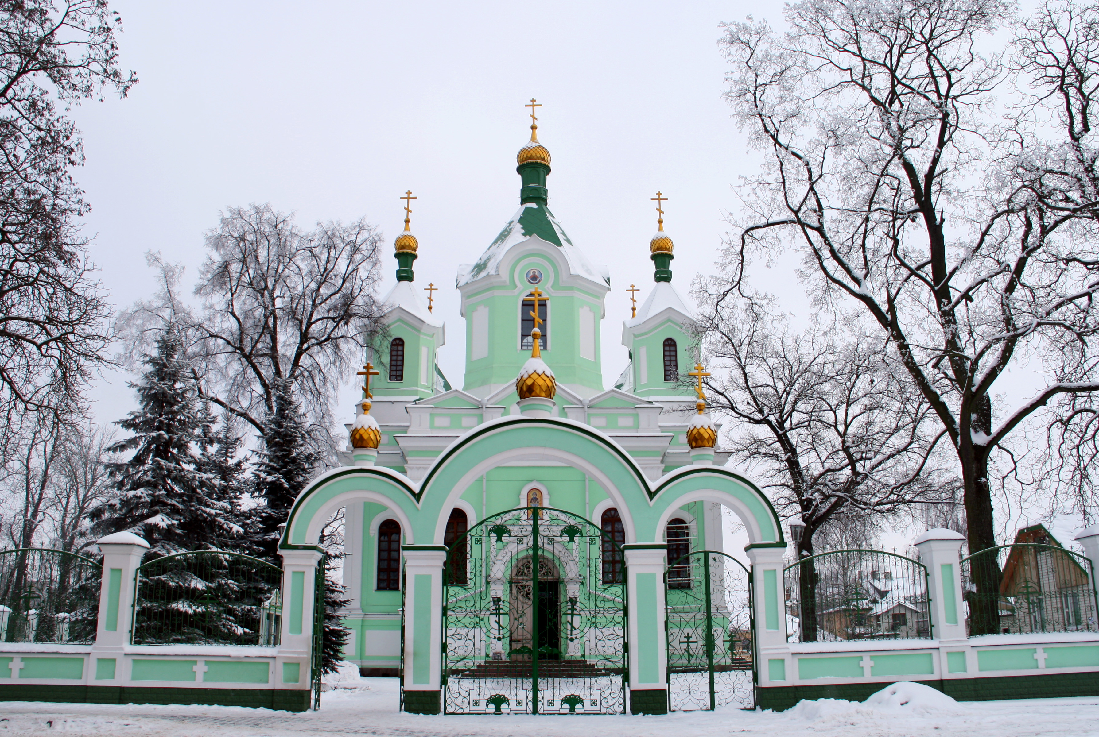 Свята-Сімяонаўскі сабор, г. БрэстБеларуская (тарашкевіца): Сьвята-Сімяонаўскі сабор. г. Берасьце This is a photo of Belarusian heritage monument. Reference number: 113Г000016 ( WLM)